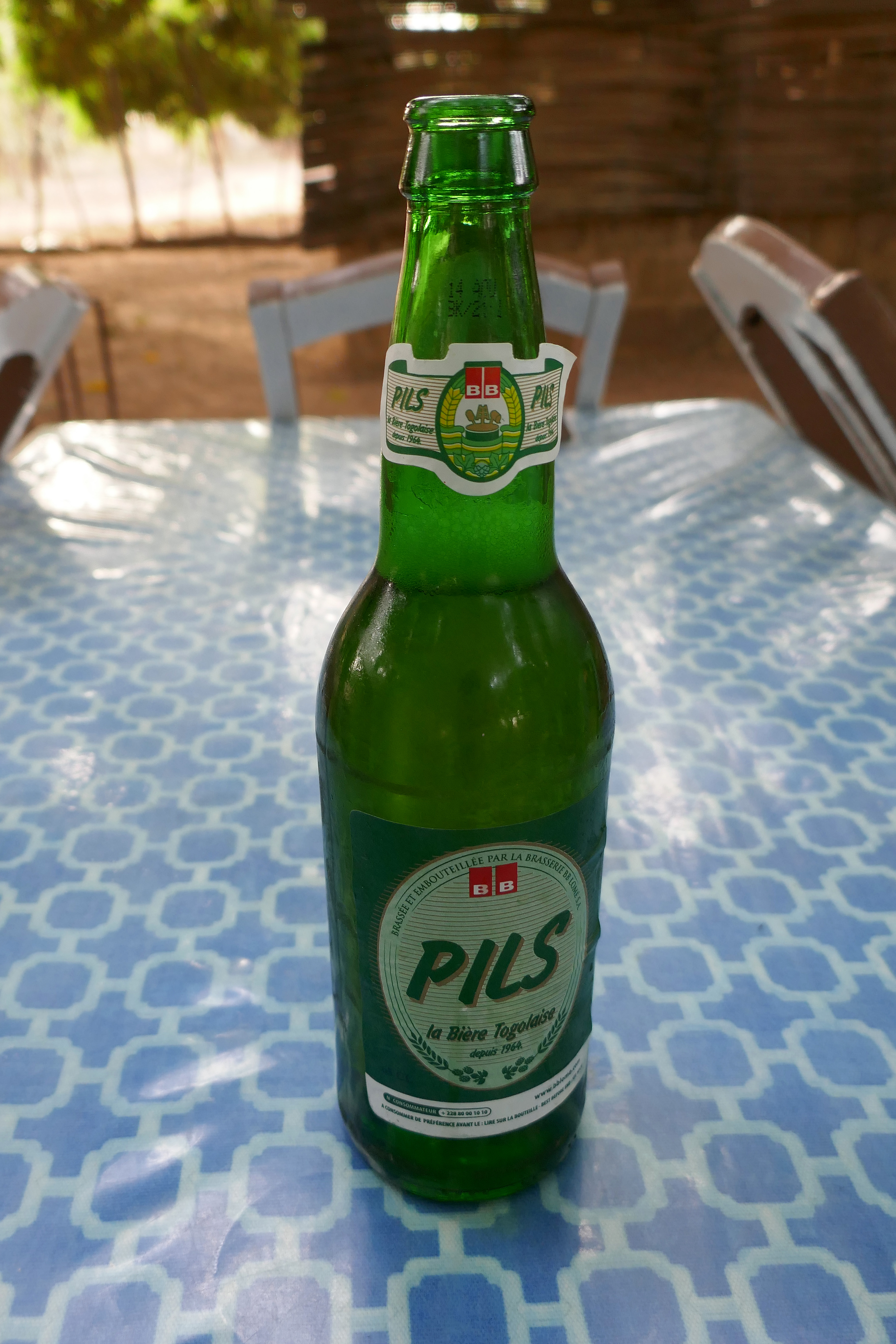 Pils, bière togolaise (ici vendue au Bénin).